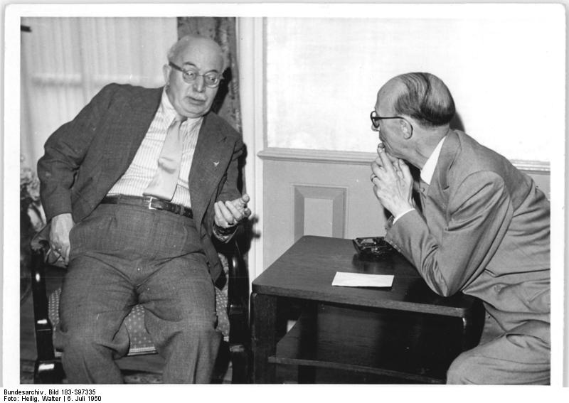 Illus-Heilig 6.7.50 Empfang bei Präsident Pieck. Präsident Pieck empfing am 6.7.1950 in seinem Amtssitz die anlässlich des Deutschen Schriftstellerkongresses in Berlin weilenden ausländischen Autoren. UBz: Während des Empfangs.- Arnold Zweig im Gespräch mit Arrigo Jacchia (Italien). 7131-50